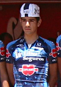 Jesús Hernández Blázquez. Liberty Seguros-Würth, Euskal Bizikleta 2005